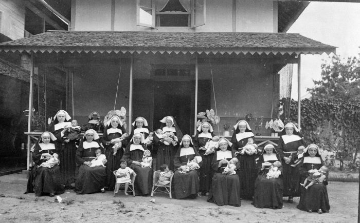 Foto. Singkawang was een van de 'hoofdstaties' (vaste verblijfplaats van ten minste één priester) van de missie in wat men noemde het Apostolisch Vicariaat Nederlands Borneo. Zoals de foto laat zien waren hier ook zusters gevestigd. Ze speelden een rol in de verschillende 'ondernemingen' van de missie die te Singkawang werden aangetroffen, zoals scholen, een ziekenhuis en een aparte inrichting voor 'melaatsen', dat wil zeggen mensen met lepra. De zusters waren vrij laat op het toneel verschenen, maar rond 1940 hadden zij, als men de Archipel als geheel beschouwt, de priesters en broeders in aantal overtroffen. (P. Boomgaard, 2001). Groepsportret van de Liefdezusters van de Rooms-Katholieke Missie met baby's in Singkawang